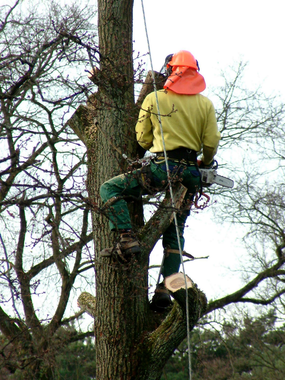 Fällen durch Baumkletterer.